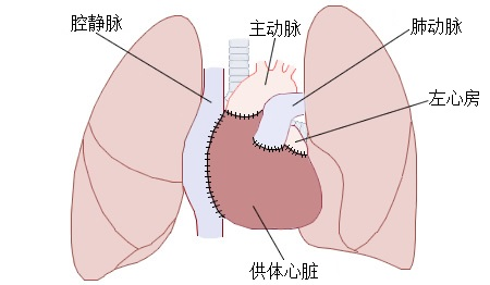 （英文原作）自制图像，使用fireworks MX（根据医学教科书中的图像），用于条目en:Heart transplantation（心脏移植）。